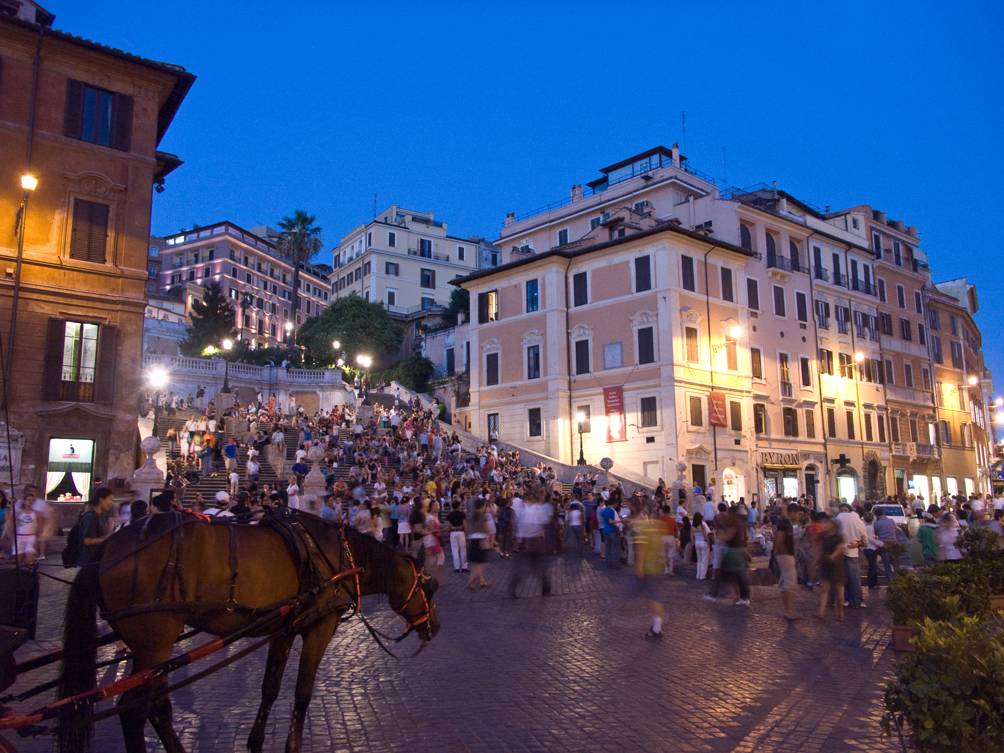 Rome - Piazza di Spagna - Le soir, la foule de cette place